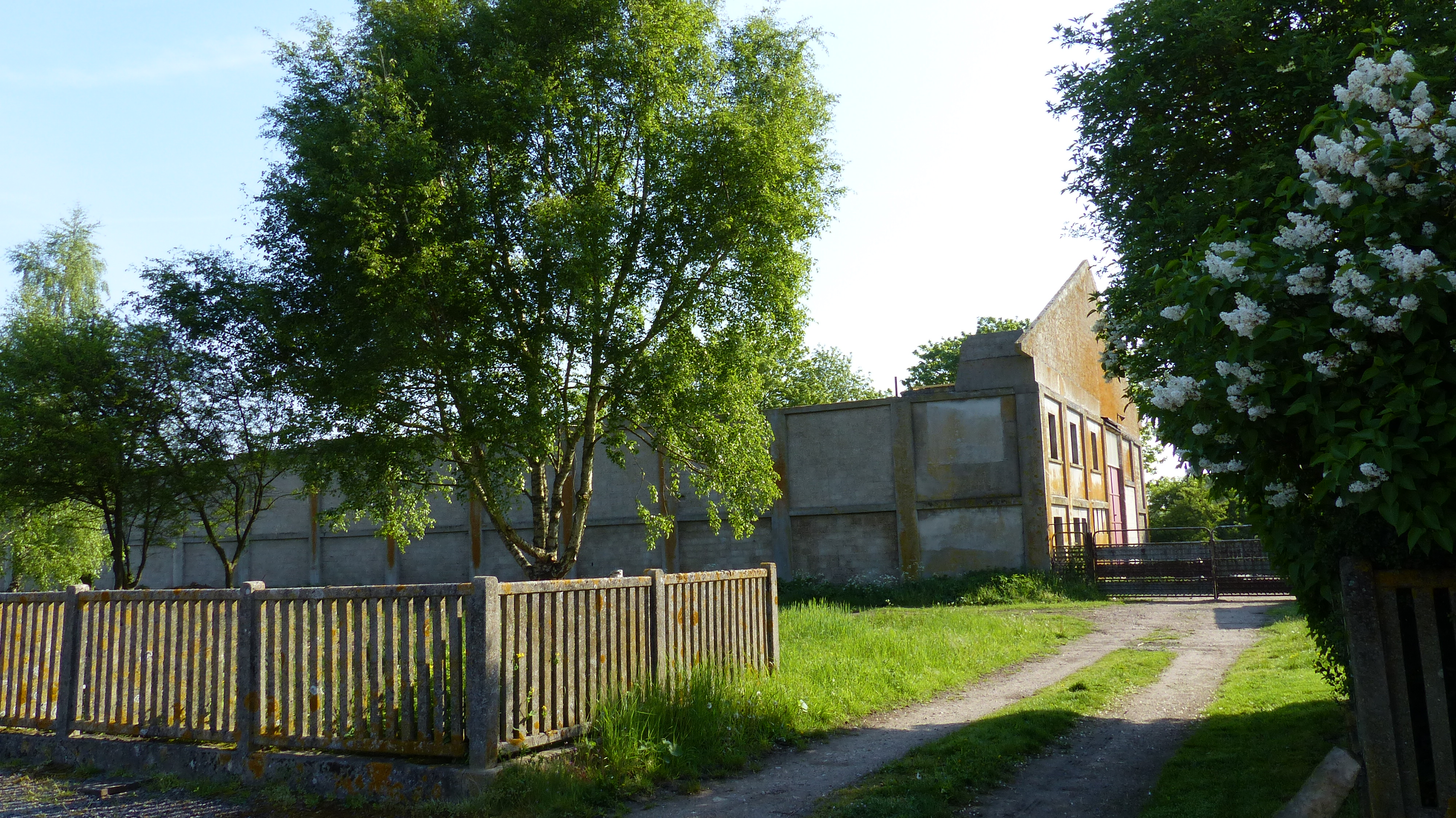 Bâtiment de stockage des engrais en gare de de Crèvecœur-le-Grand, avant la reconstruction de sa toiture afin d'en faire le nouveau dépôt du MTVS